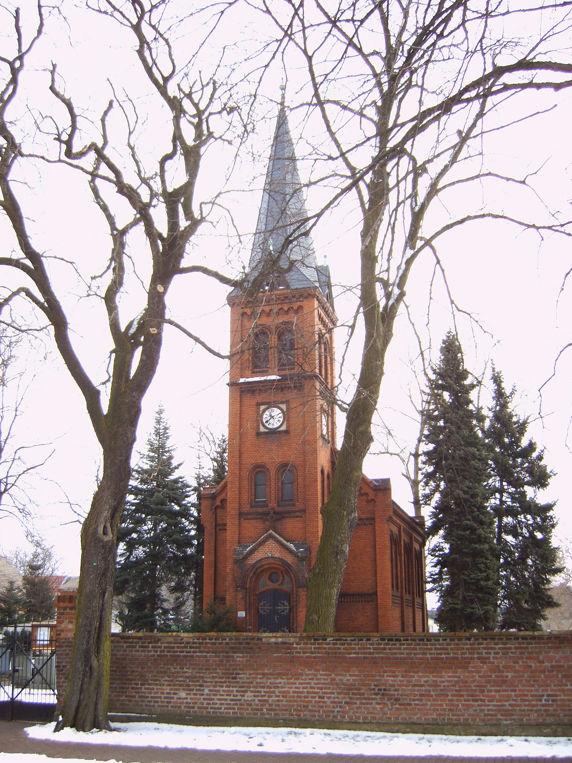 Dorfkirche von Jütrichau, Sachsen-Anhalt, Deutschland, Bild aufgenommen am 13.2.2006 Urheber: Olaf Meister